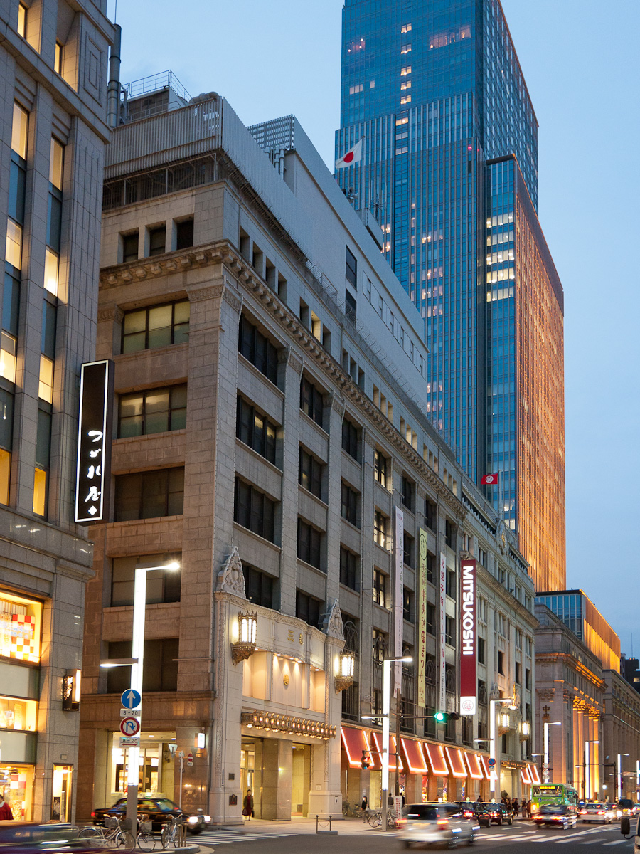 三越本店新館。